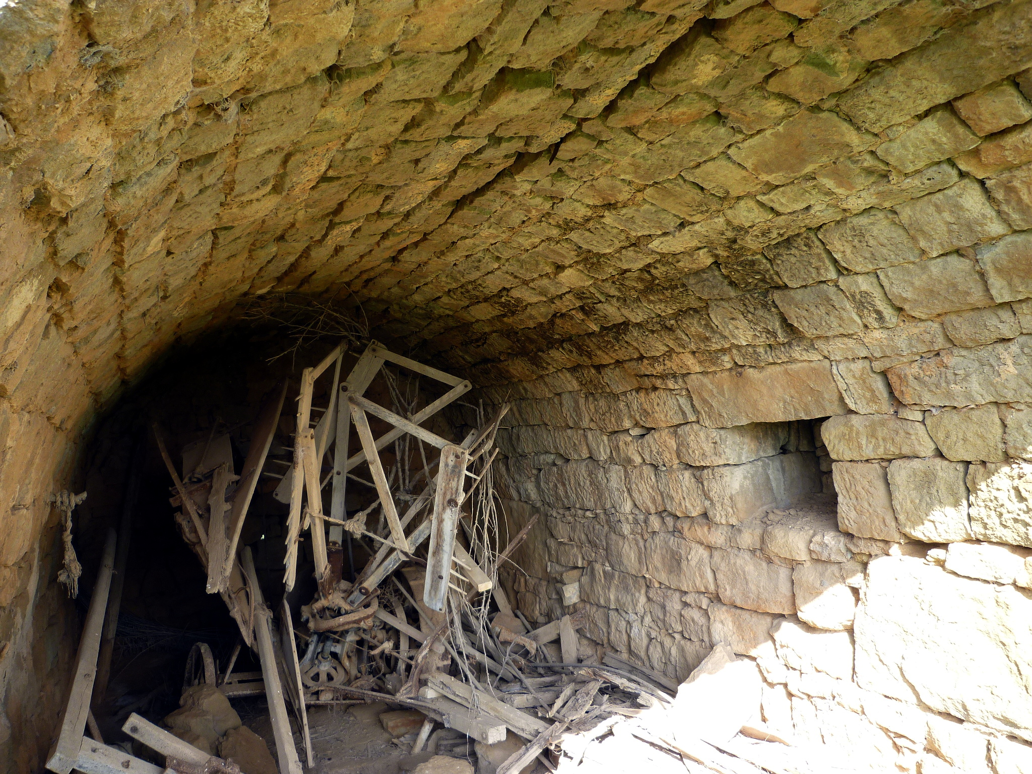 Cabana de volta de Palou (Torrefeta i Florejacs): una antiga màquina de segar a l'interior